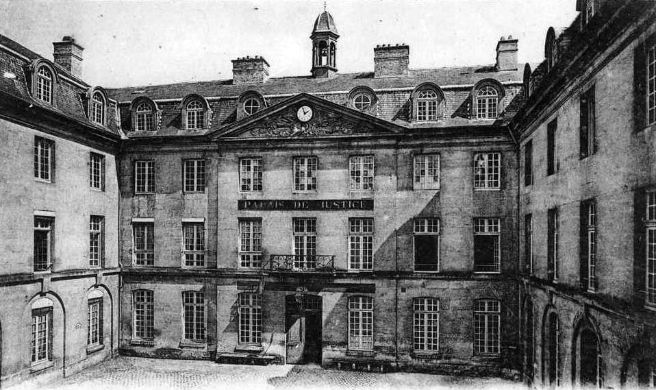 Le nouveau bâtiment conventuel de l'ancien hôpital de la Charité de Senlis, terminé extérieurement vers 1771, rue de la République. Après la fermeture de l'hôpital en 1833, il a servi de palais de justice et ssous-préfecture jusqu'à la destruction pendant la bataille de Senlis, le 2 septembre 1914.